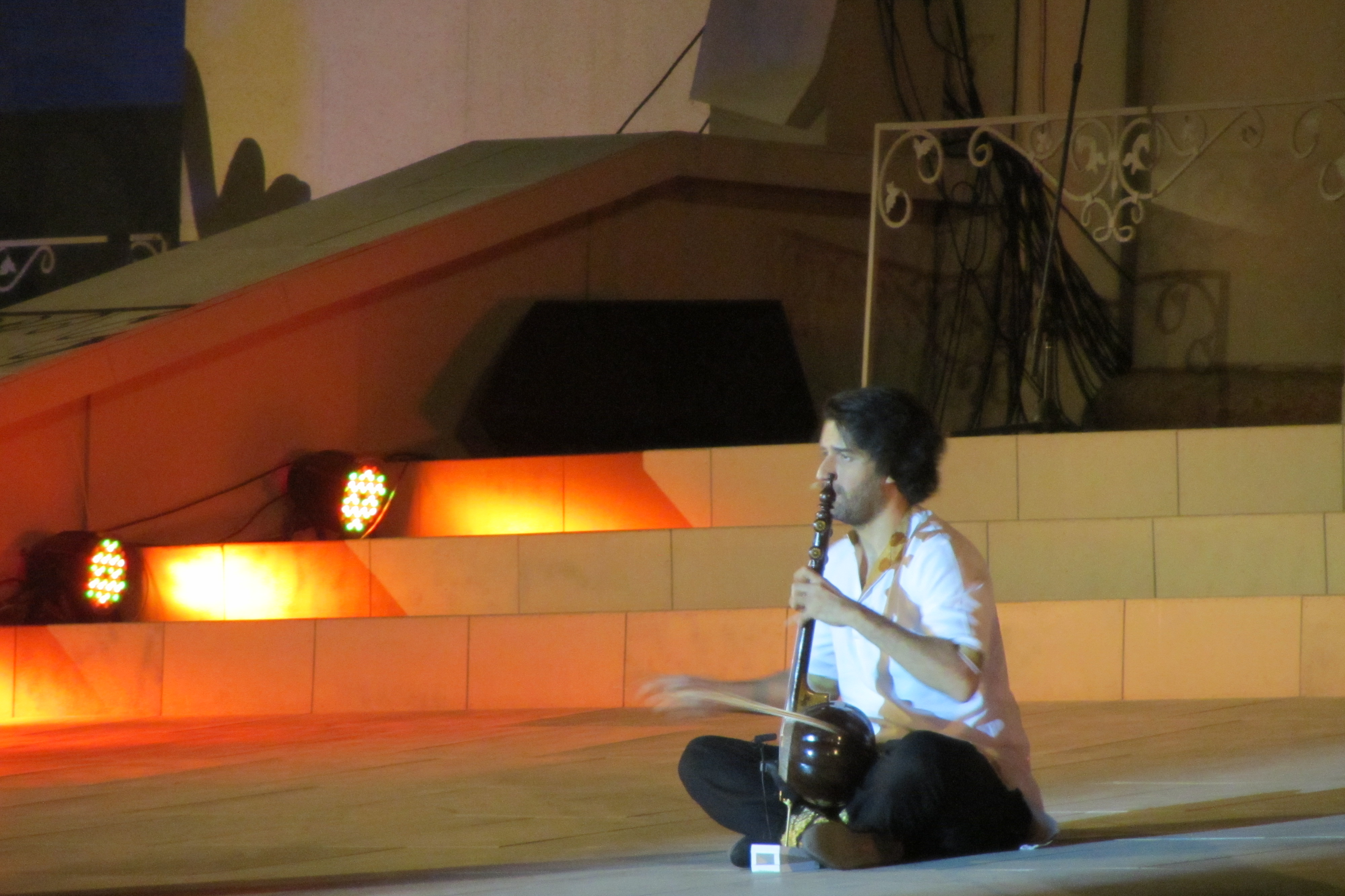 سهراب پورناظری Sohrab Pournazeri